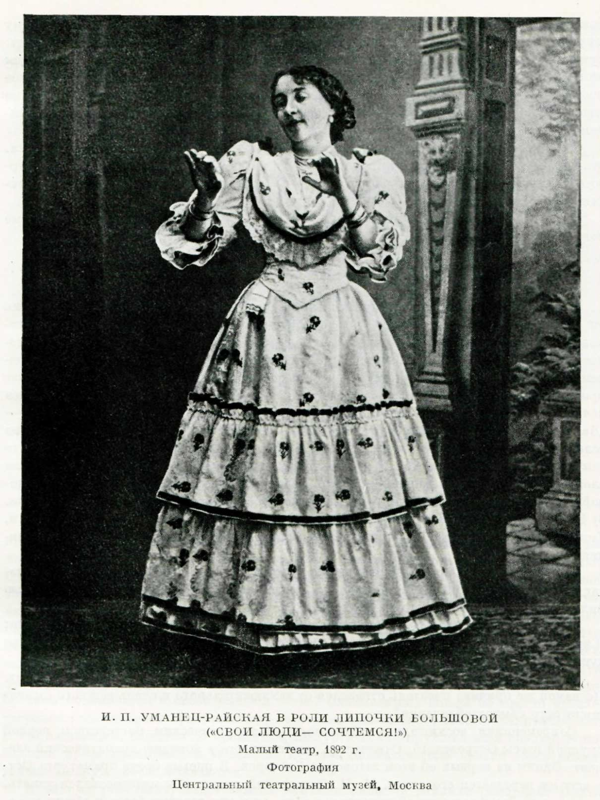 Фотография из спектакля Малого театра. 1892 г.